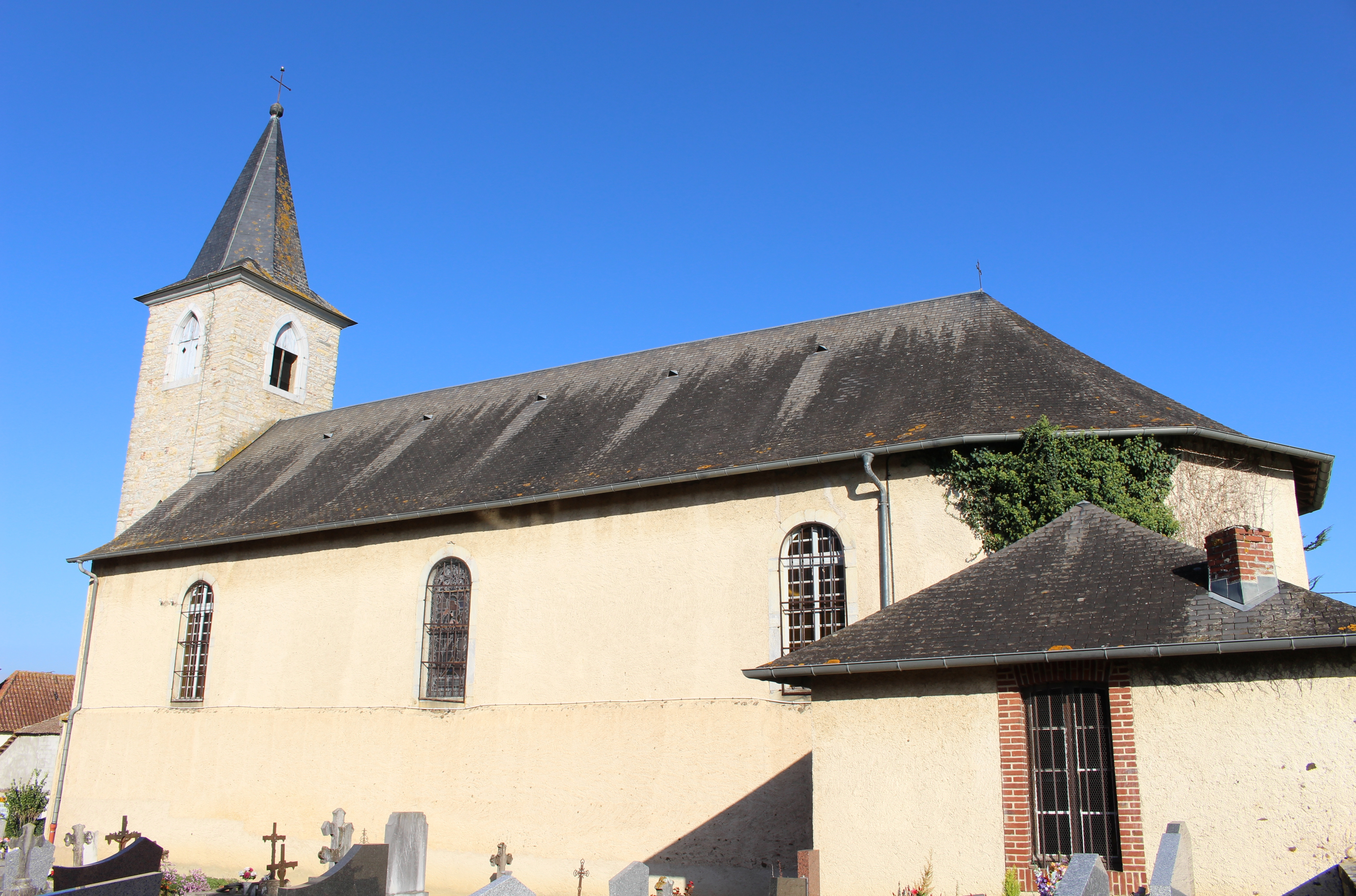 Église de l'Assomption de Moulédous (Hautes-Pyrénées)